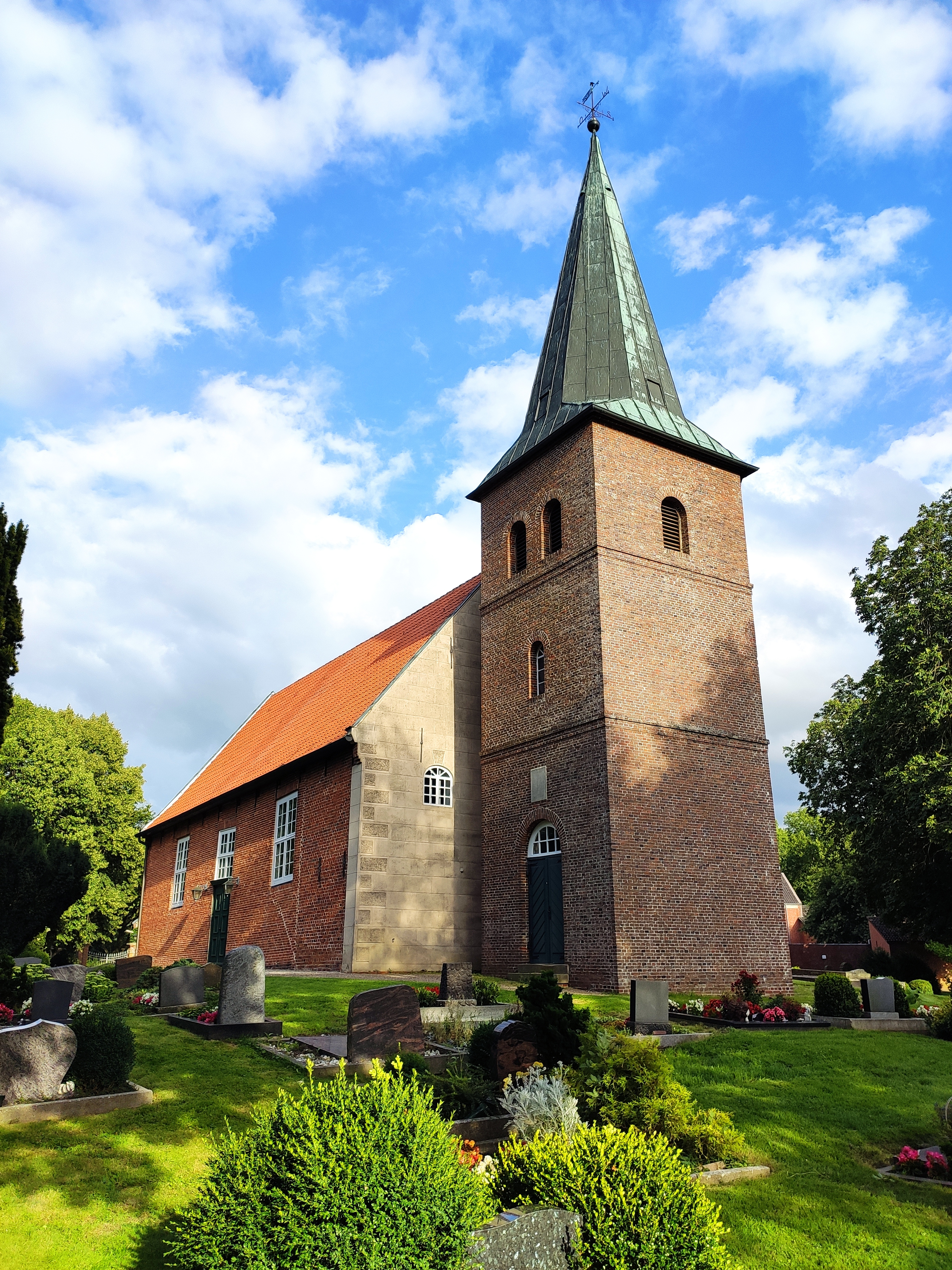 St. Vitus